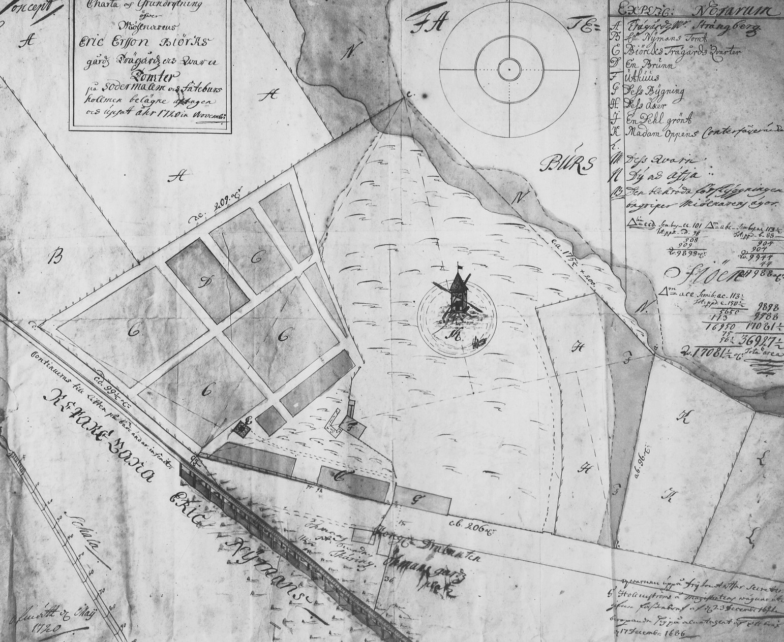 Karta över mjölnar Eric Ersson Biörks tomter och kvarn vid Fatburssjön